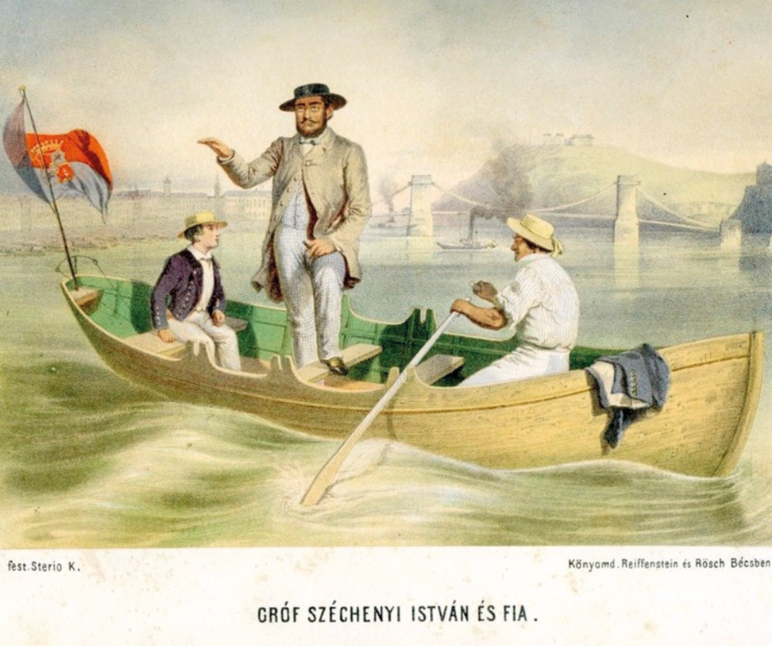 Gróf Széchenyi István Béla fiával megtekinti az épülő Lánchidat (Sterio Károly rajza, színezett kőnyomat, Az utolsó láncszem beszerelését 1848. július 18-án kezdték meg a Lánchíd építésekor. Mindhárom hídnyílásban négy-négy láncfelhúzásra kellett sort keríteni. Tizenegy gond nélkül ment végbe, azonban az utolsónál baleset történt. A láncot felhúzó csigasor egyik láncszeme szétpattant, a lánc rázuhant az úszóállványra, melyet összetört, majd beleesett a Dunába. A műveletet az állványról szemlélő emberek, köztük Széchenyi István, szintén a Dunába estek